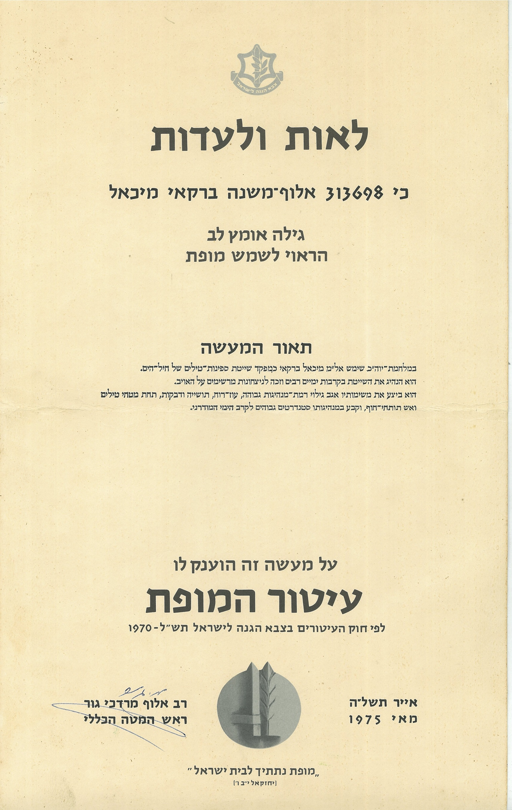 תעודת עיטור המופת שניתנה לאל"מ ברקאי על פעילותו כמפקד שייטת ספינות הטילים במלחמת יום הכיפורים